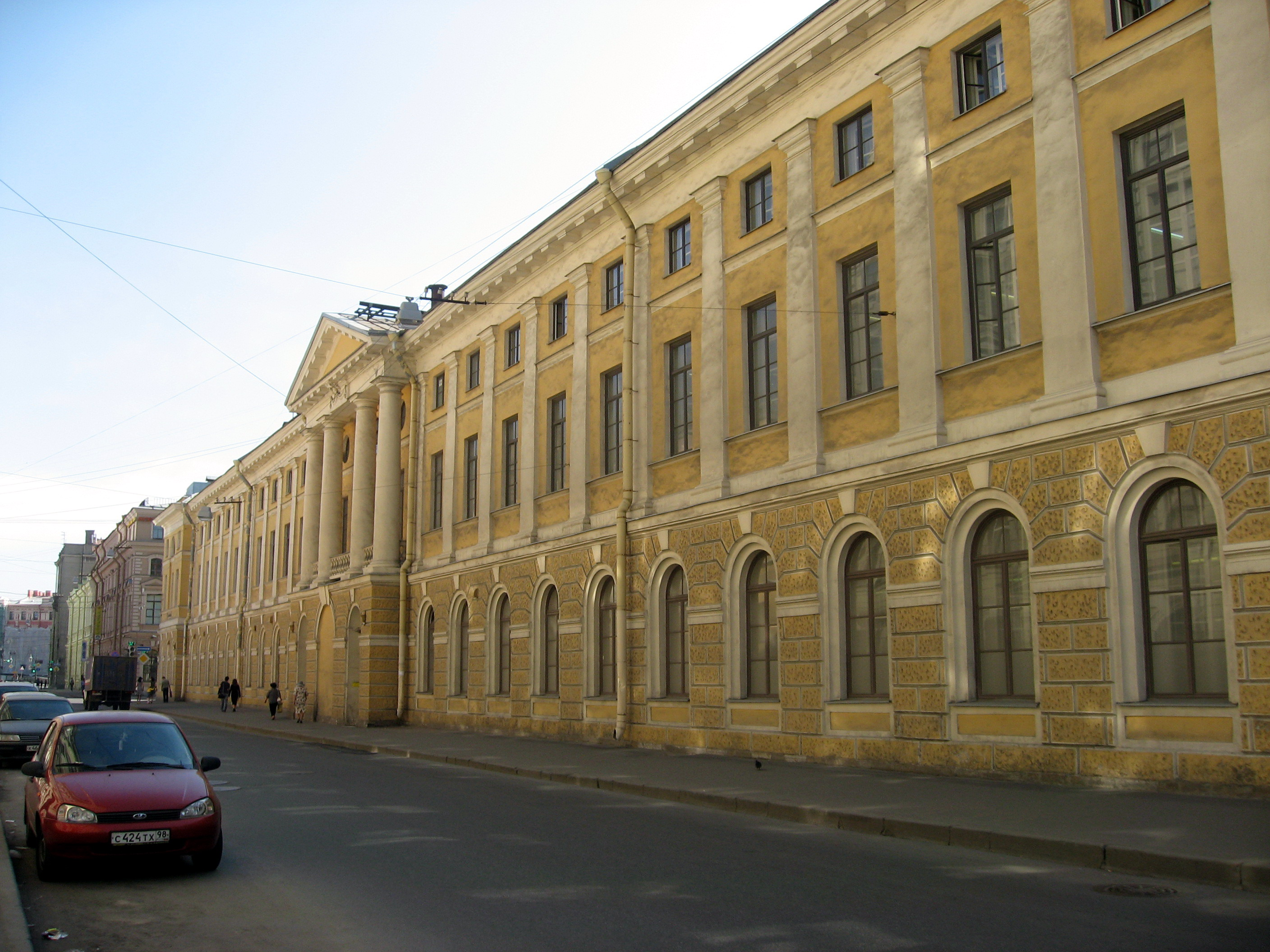 Sankt-Petěrburg